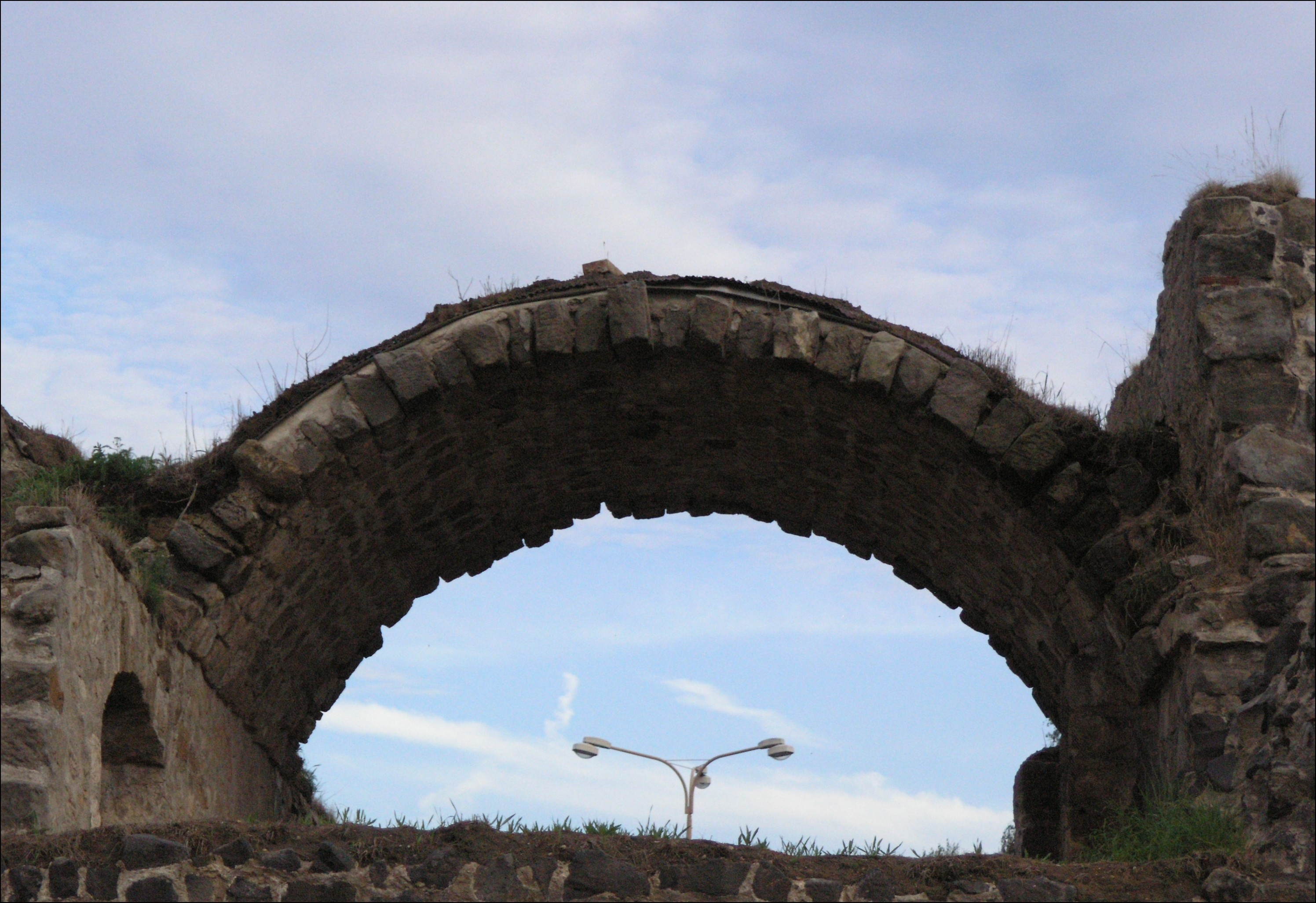 Hrad Lipý